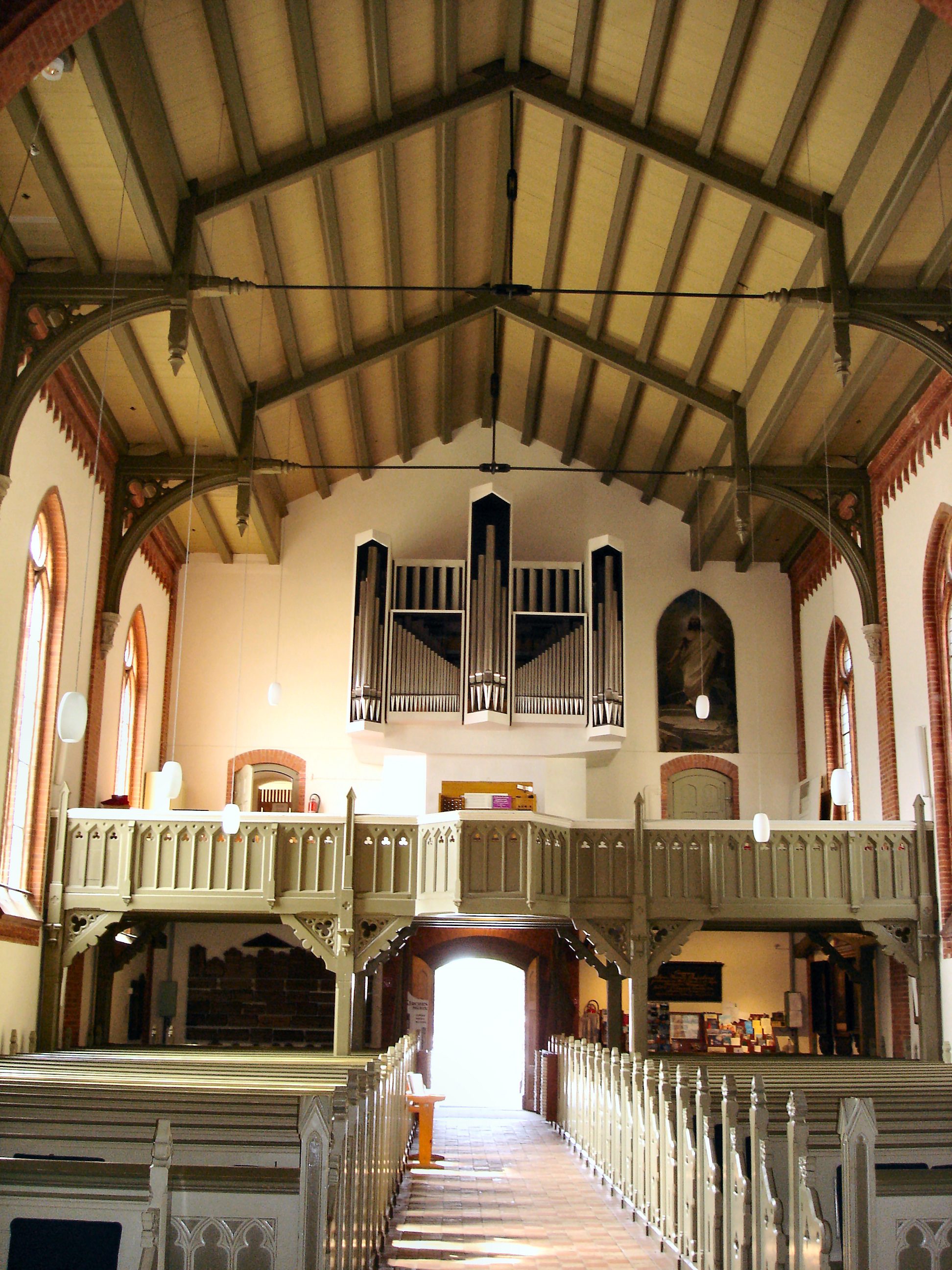 Kirche Warnemünde Orgel / Church Warnemünde organ